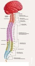 طناب نخاعی یکی از اعضای دستگاه عصبی محیطی